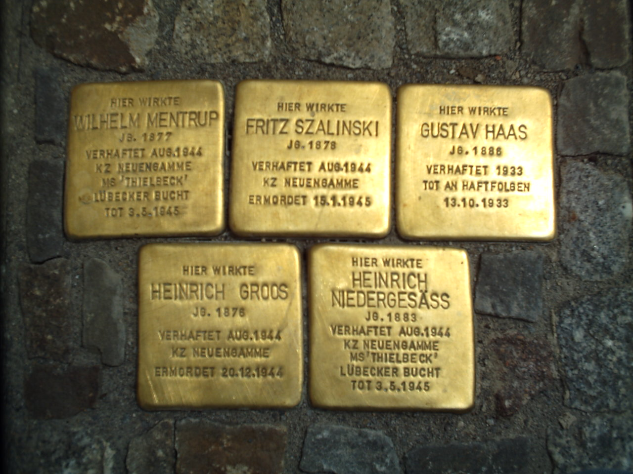 Osnabrücker Stolpersteine, Kollegienwall 14/14a.